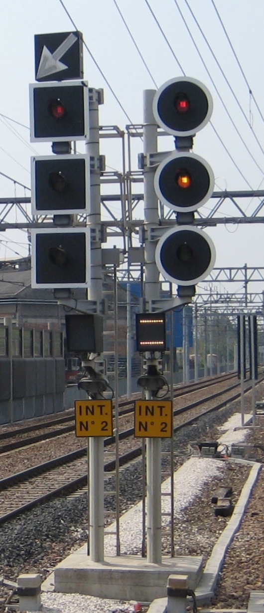 Segnali protezione esterni padova lato venezia, vela quadra linea storica, vela tonda linea AV.